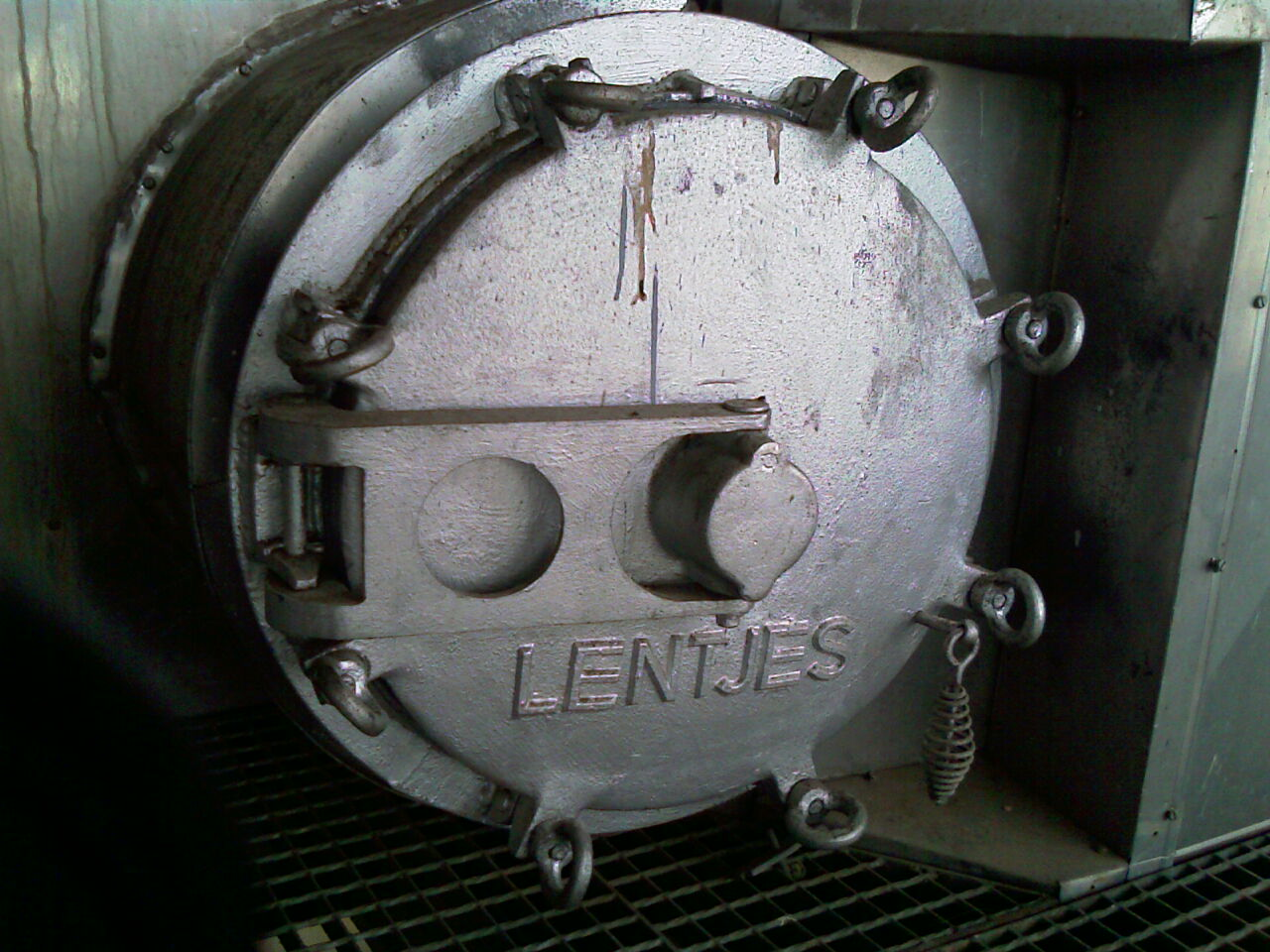 Mannloch an einem Dampfkessel der Firma Lentjes